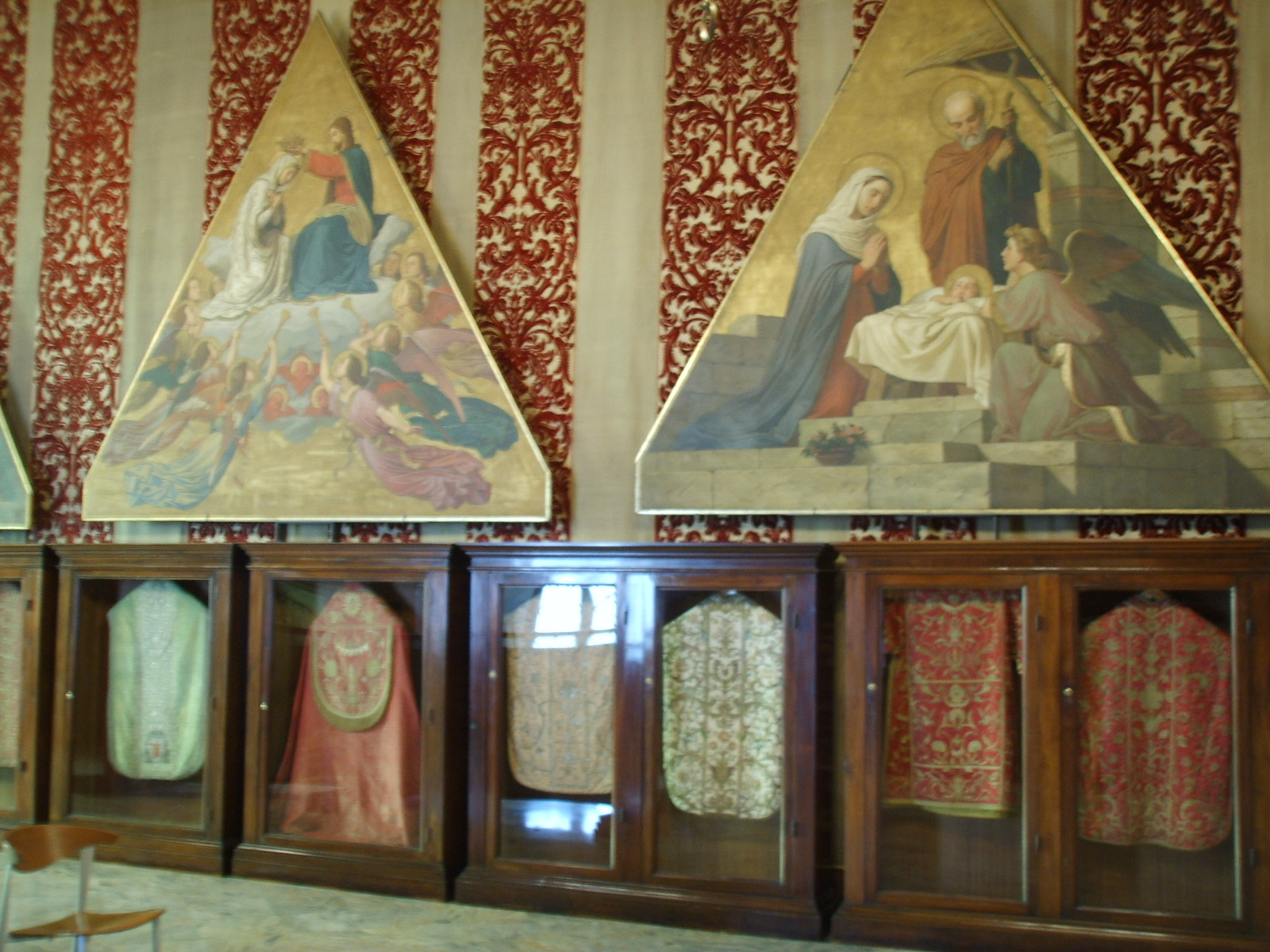 Opera del Duomo Museum in Siena, Italy